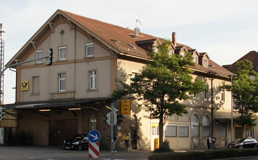 Nürtingen Postgebäude